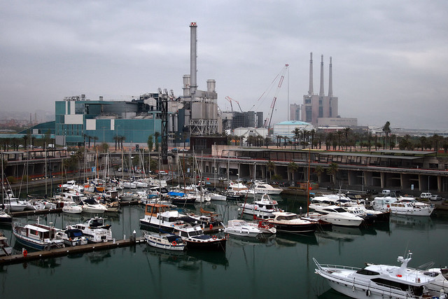 Port Fòrum i incineradora de Sant Adrià